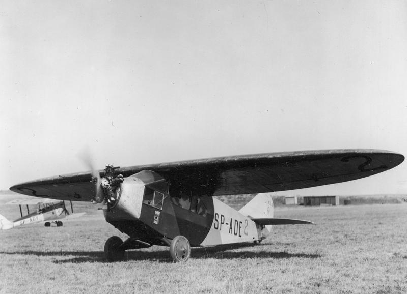 LKL-2 bis na letišti